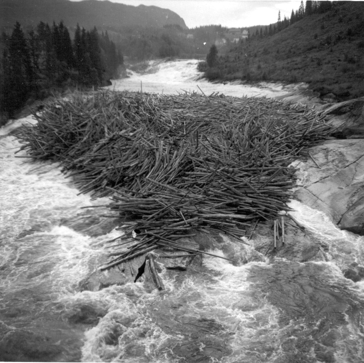 Tømmerfløting på Namsen i Nord-Trøndelag, her fra Tømmeråsfoss i sideelva Sanddøla.